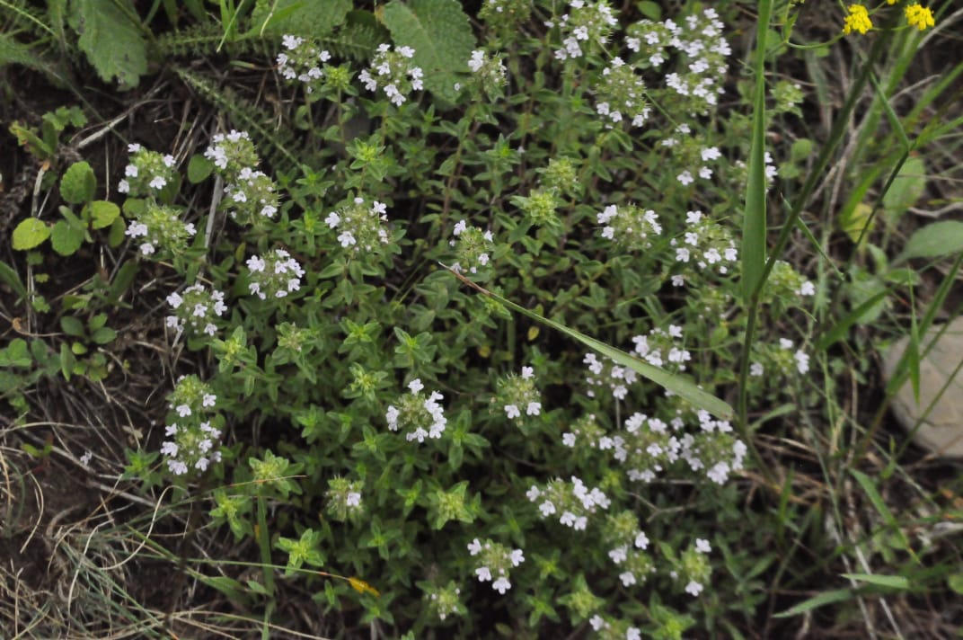 Кустик тимьяна холмового. Кулинский район Дагестана.